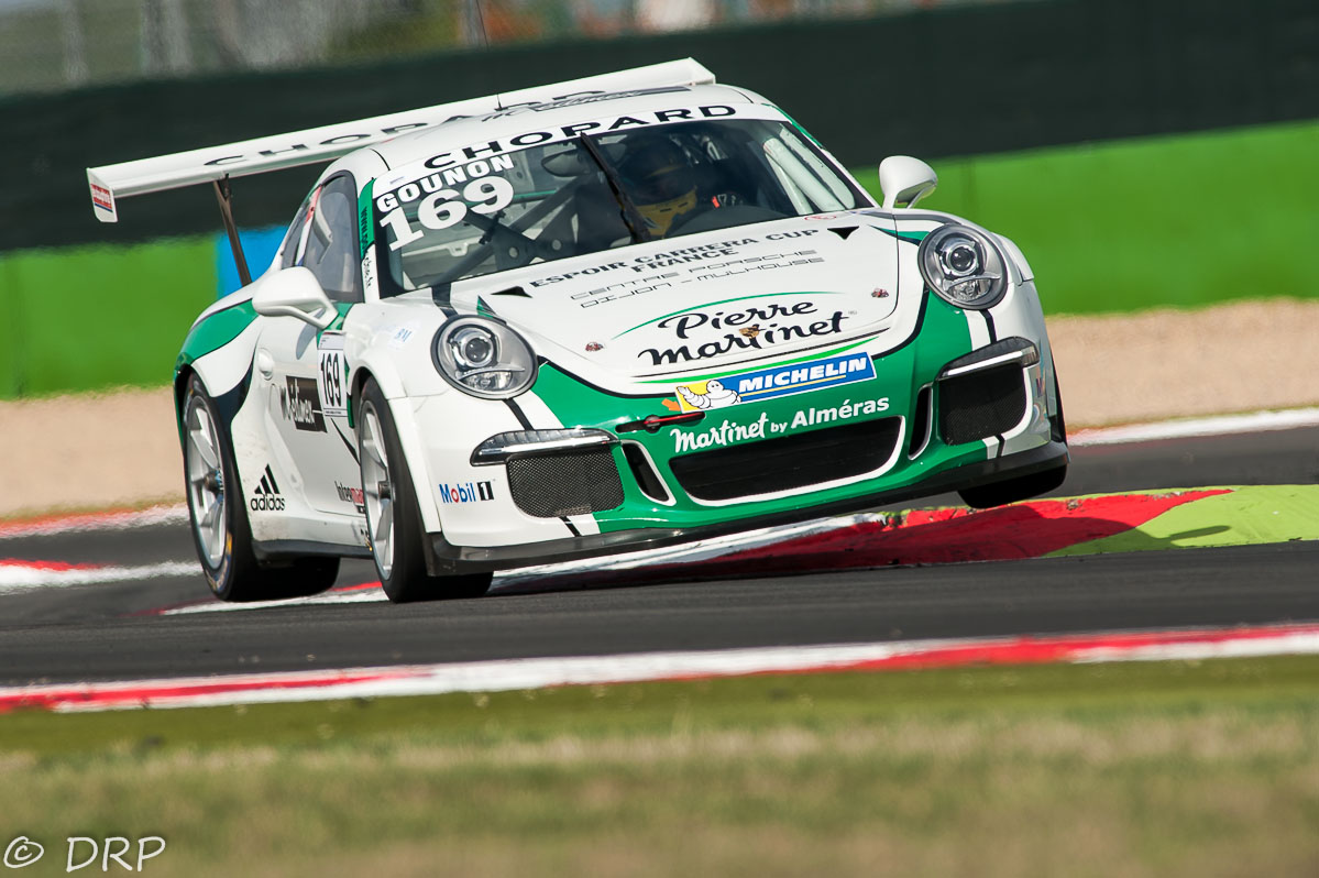 Photographie de Jules Gounon sur sa Porsche Carrera.